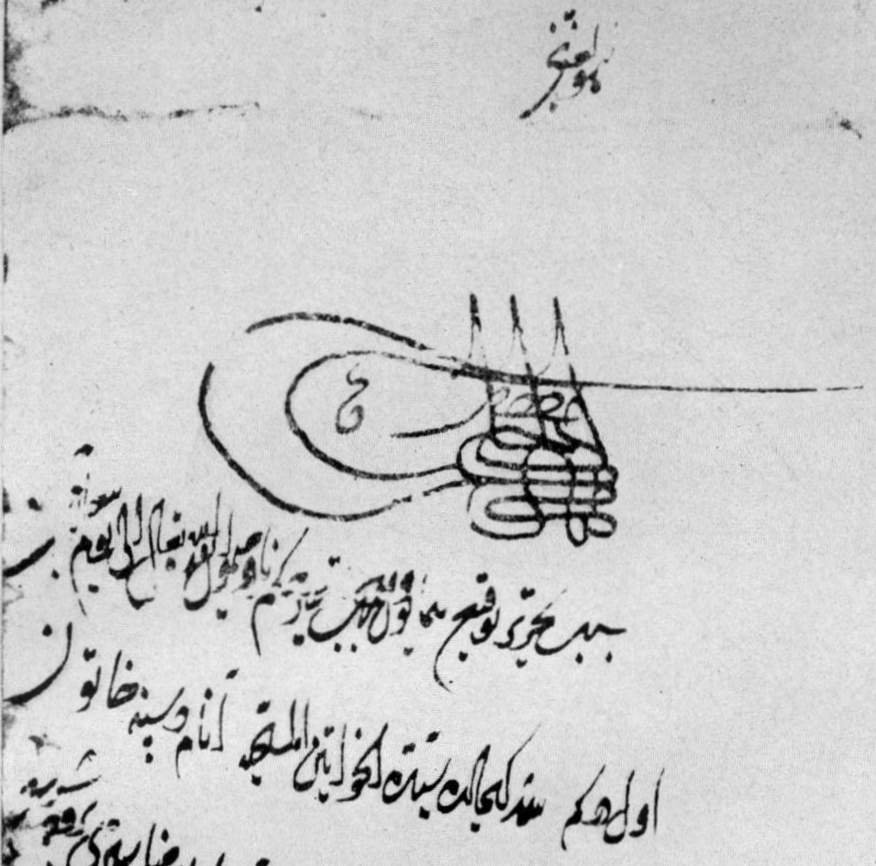 Freibrief (Detail: Kopf des Fermans) Mehmeds II. für seine Stiefmutter Despina Hatun (Mara Branković) aus dem Jahr 1459.